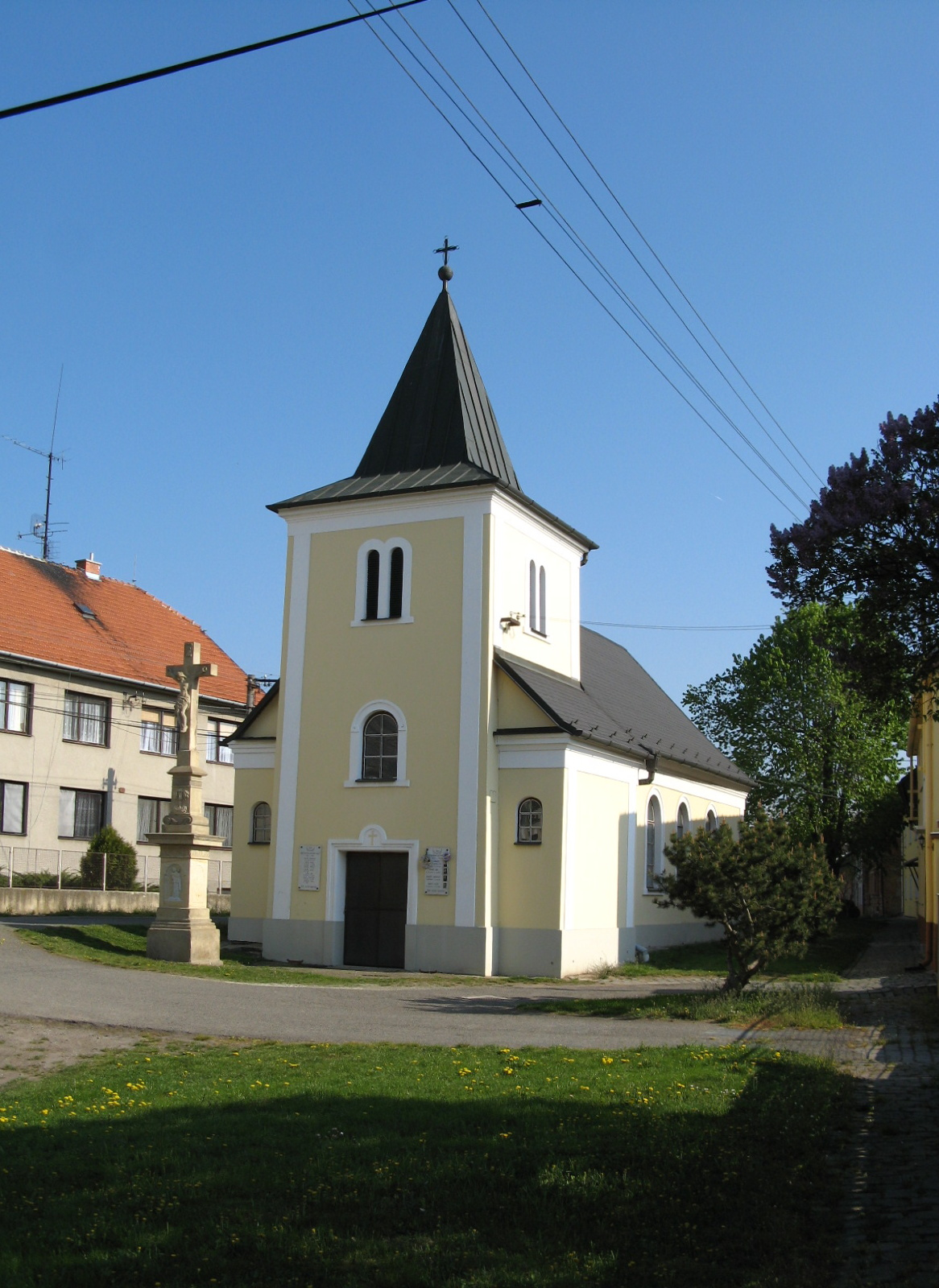 Kaple sv. Floriána (Hrdibořice), na návsi, Hrdibořice